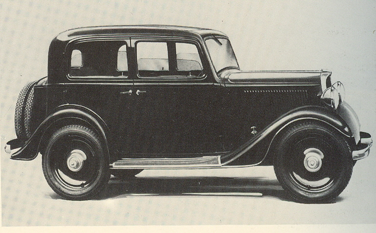 Fiat 508 Ballila Sedan (1934)